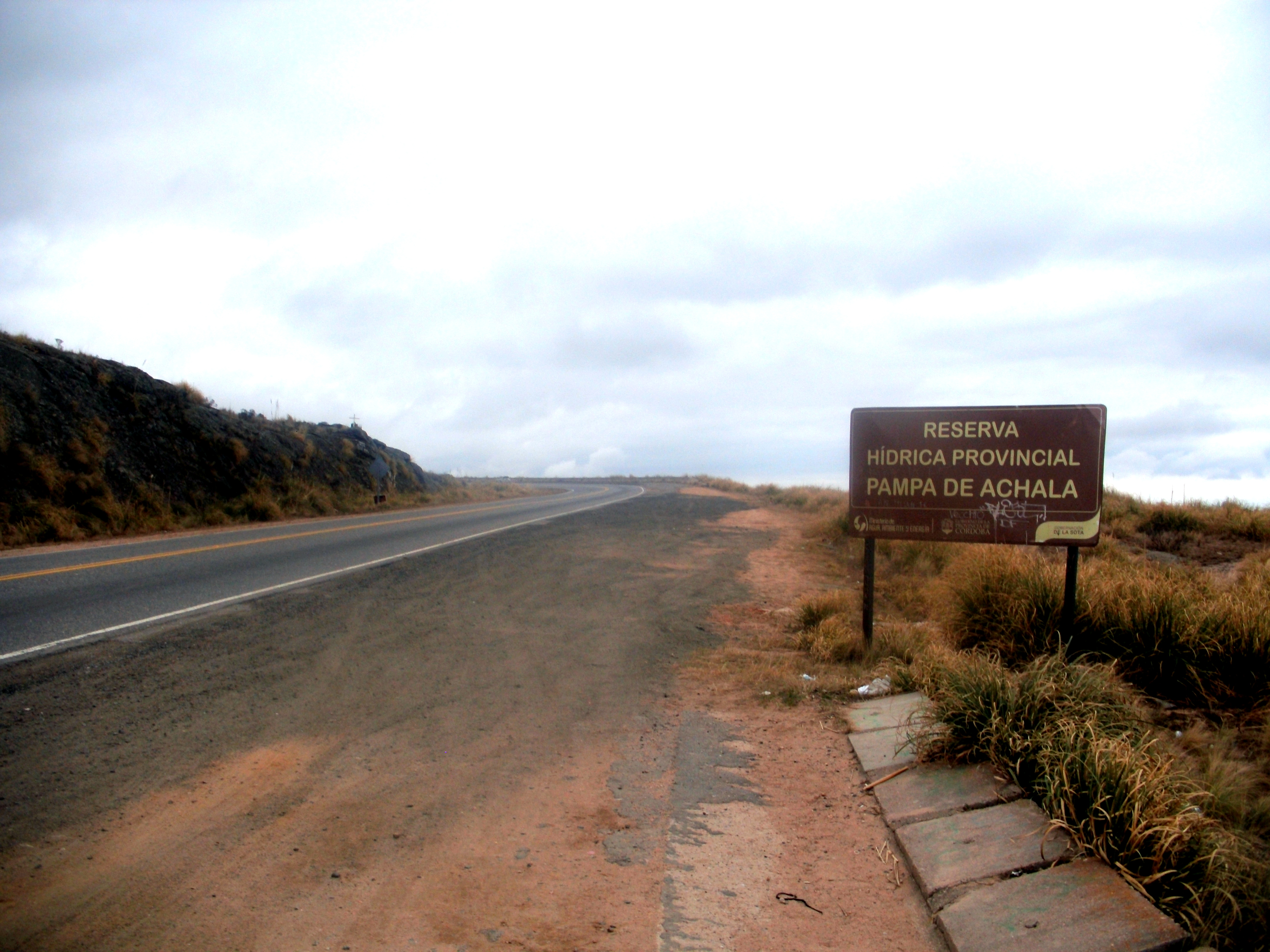 Ingreso a la reserva por la ruta provincial 34